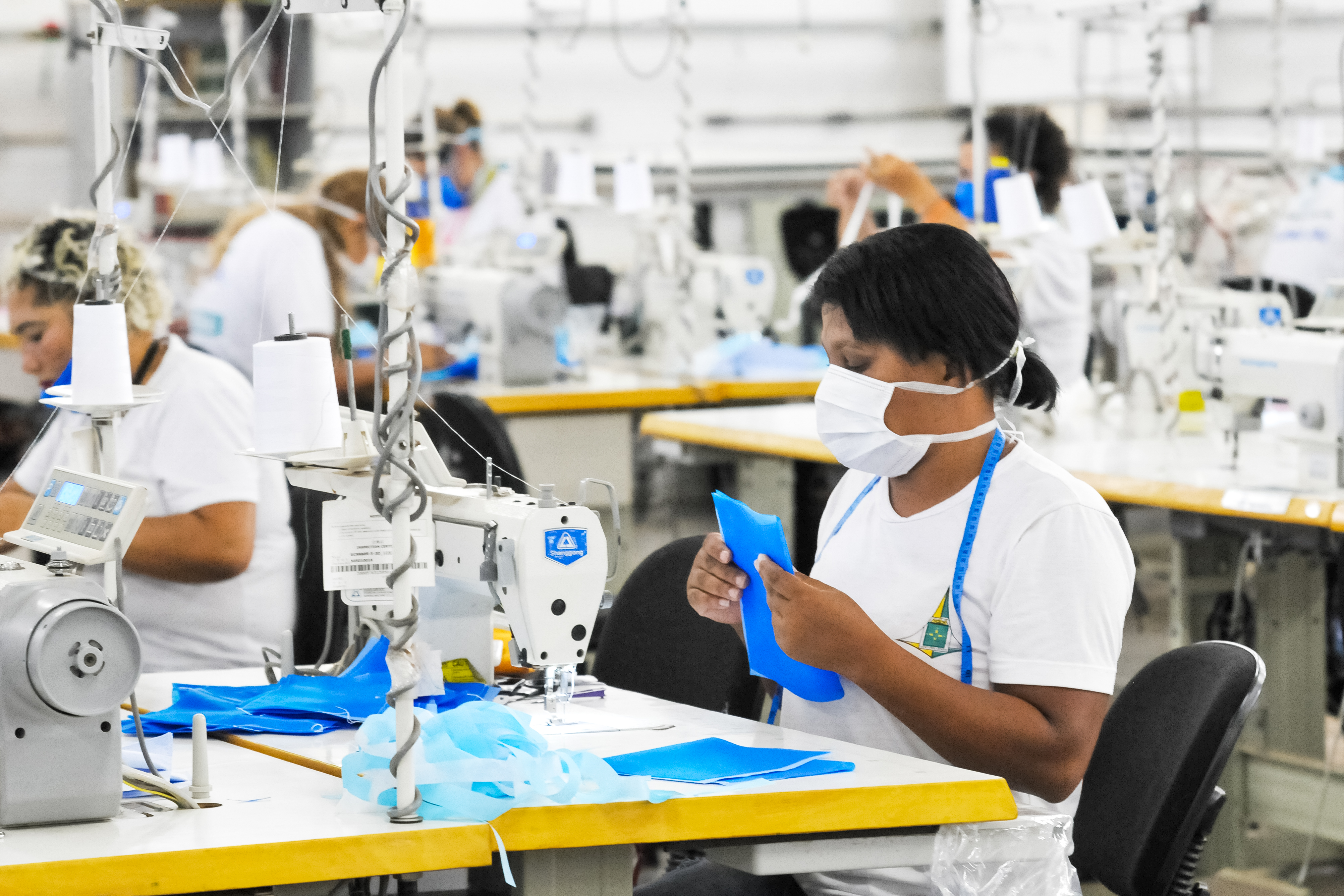 Uma campanha em prol do cidadão. Esse é o espírito do projeto, “Máscaras Solidárias”, da Secretaria de Justiça e Cidadania (Sejus), iniciativa que pretende não só conscientizar a população do Distrito Federal a como usar esse utensílio tão urgente e necessário em tempos de Covid-19, mas também confeccionar o produto em tecido, já que o material se encontra em falta no mercado.Foto: Joel Rodrigues/Agência Brasília